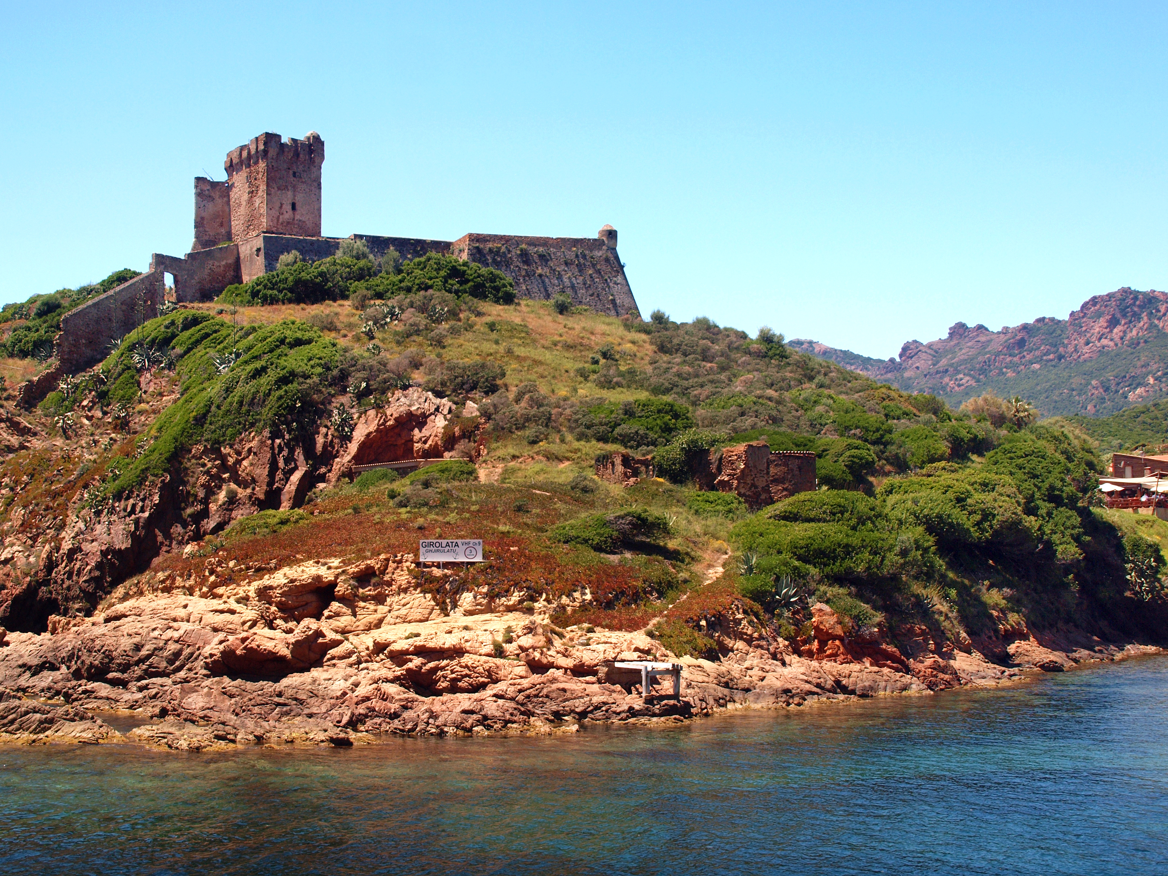 Osani, Ouest Corse (Corse) - Fortin génois de Girolata au fond du golfe éponyme. Monument historique